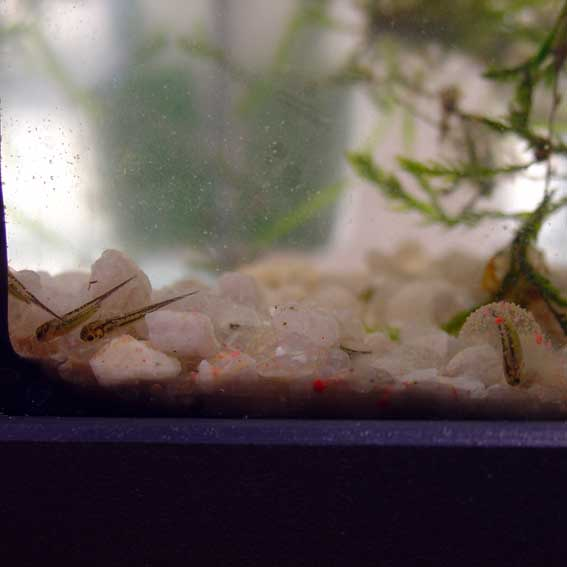 larves de Pleurodeles de Waltl